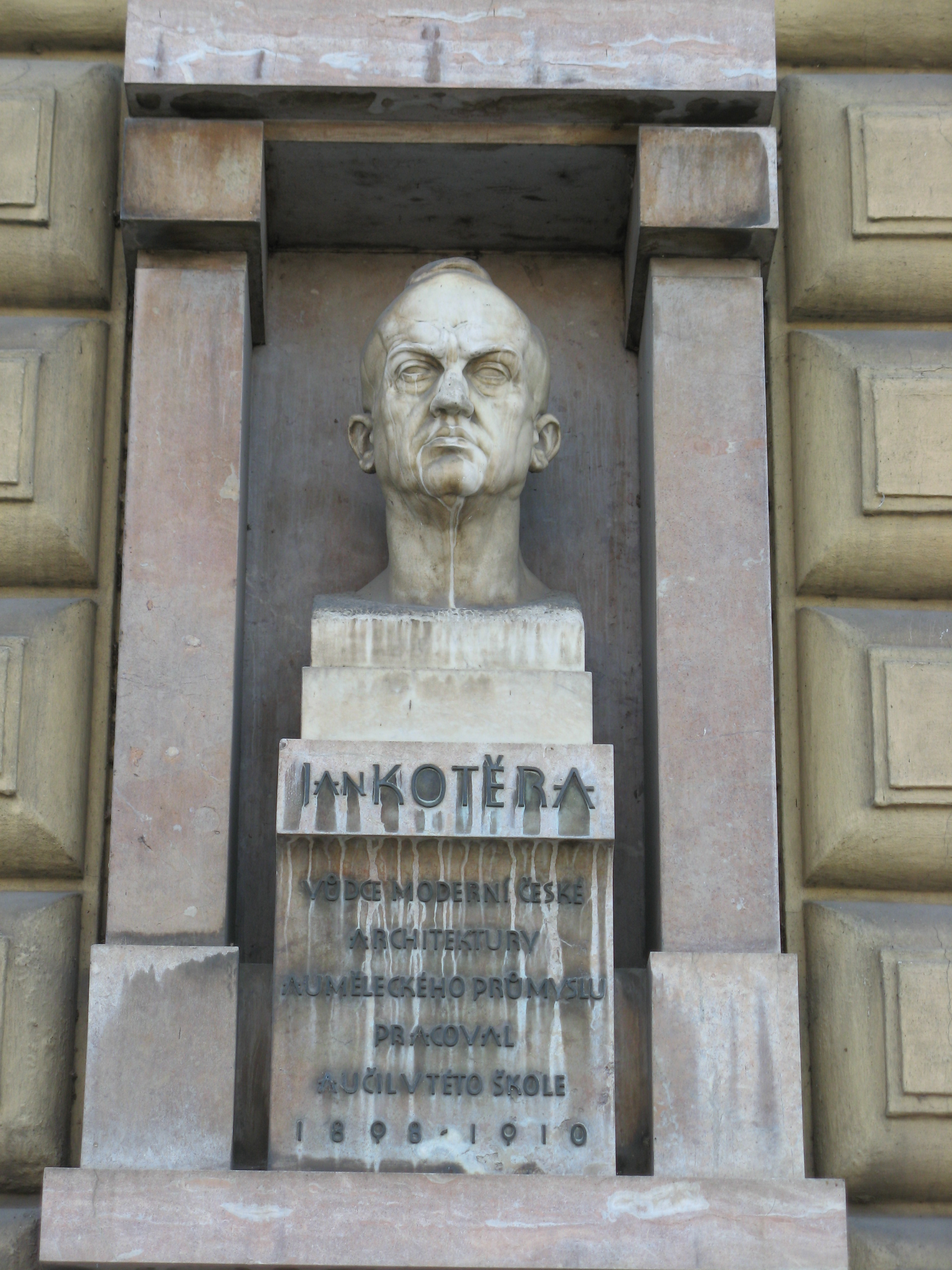 Bohumil Kafka: Busta architekta a učitele Jana Kotěry, budova VŠUP, Praha 1-Staré Město, č. p. 80, náměstí Jana Palacha 3, deska osazena v roce 1924; text: "Jan Kotěra vůdce moderní české architektury a uměleckého průmyslu pracoval a učil v této škole 1893-1910"